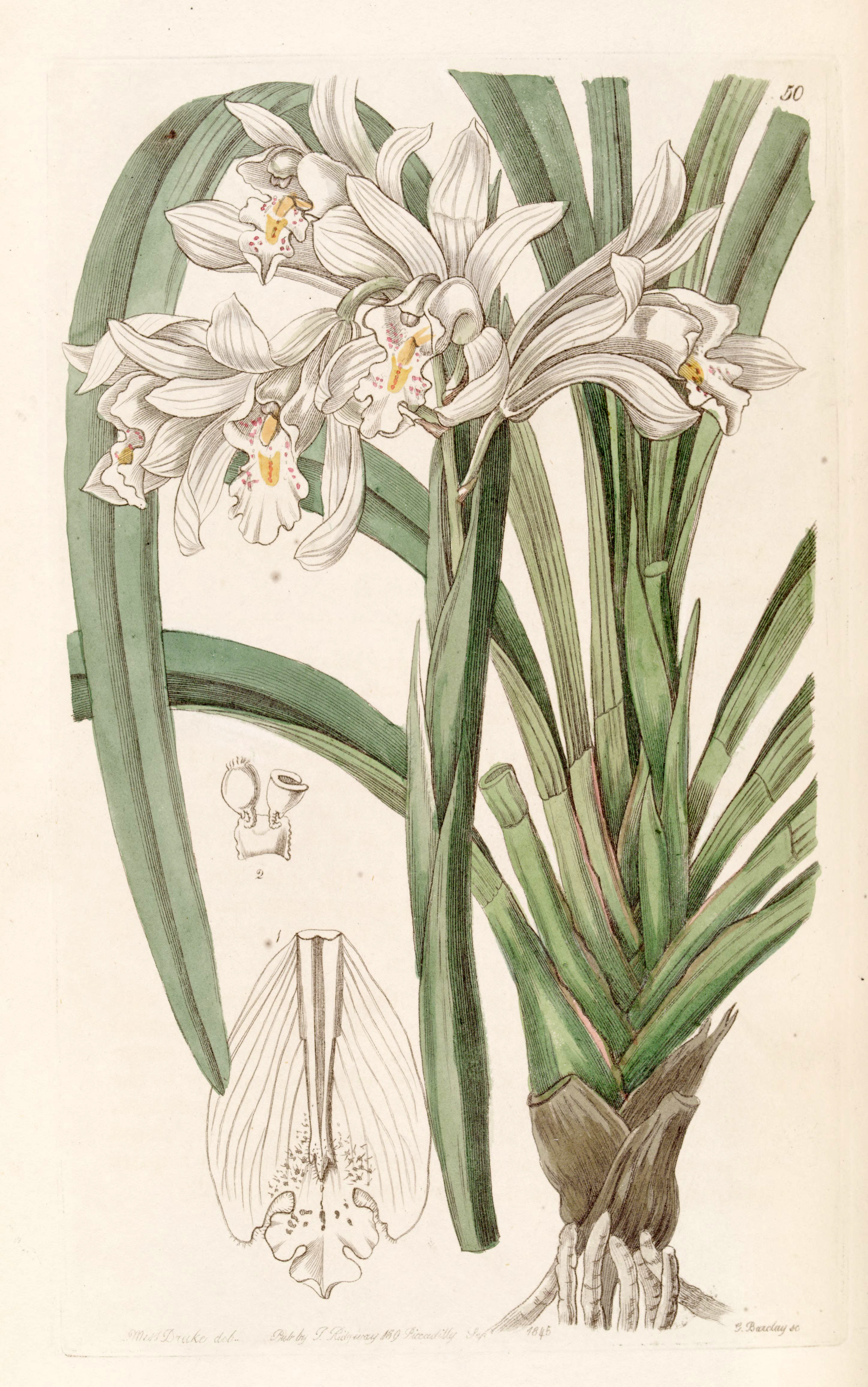 Cymbidium mastersii